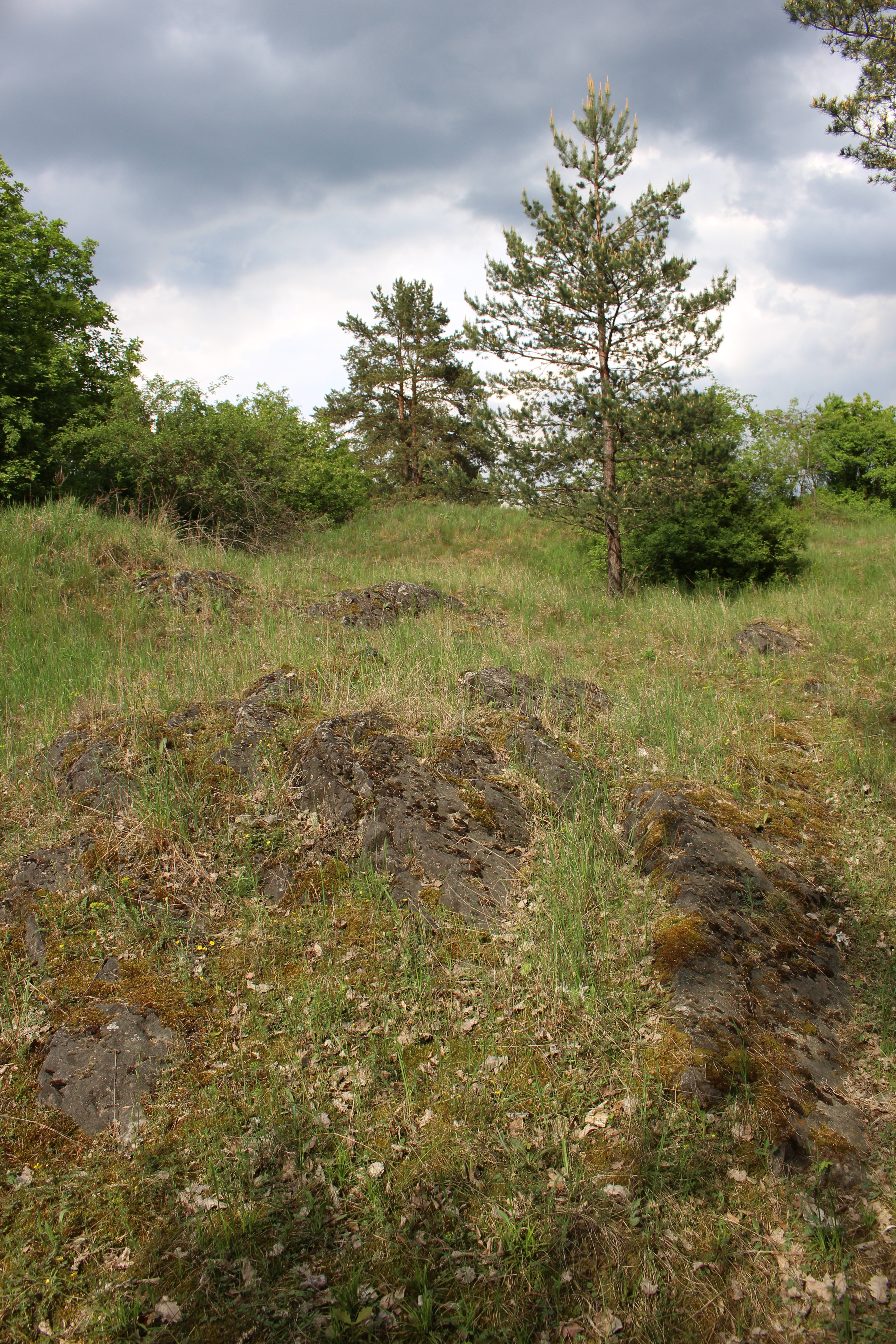 Přírodní památka Svídovec, k.ú. Rohozec, okres Brno-venkov, Jihomoravský kraj, výchozy vápence